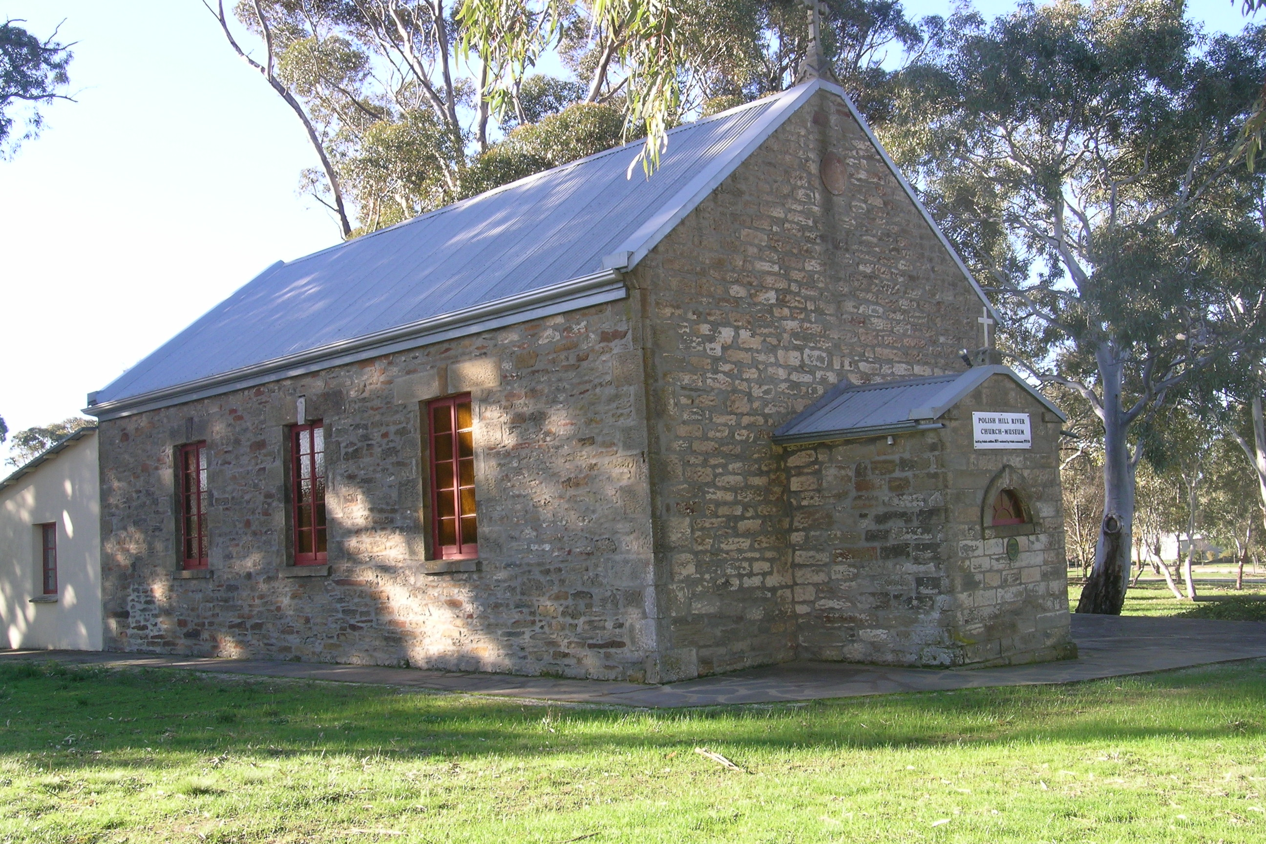 Kościół w Polish Hill River